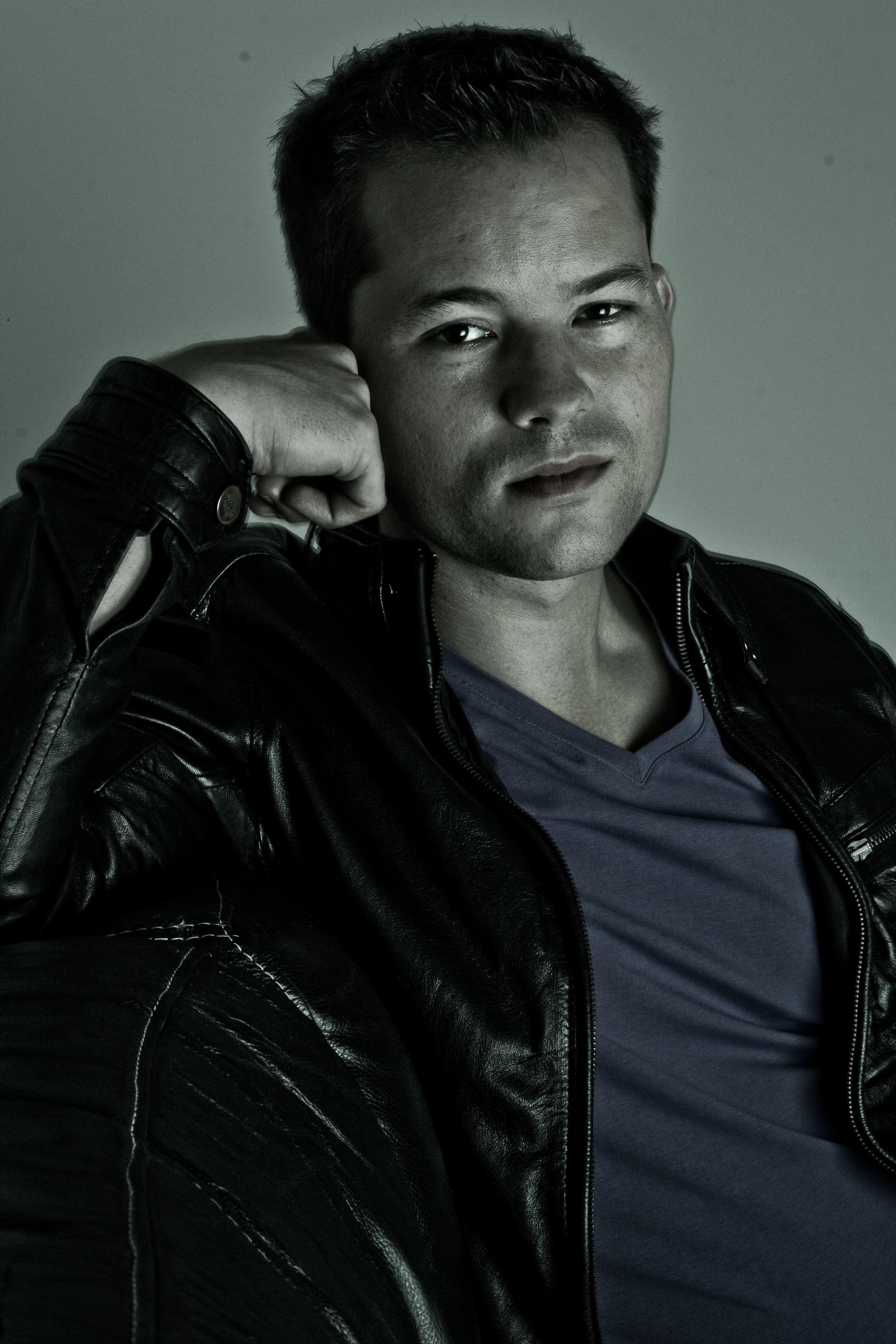 Vincent Kliesch (* 17. Oktober 1974 in Berlin) ist ein deutscher Schriftsteller, Moderator und Comedian.